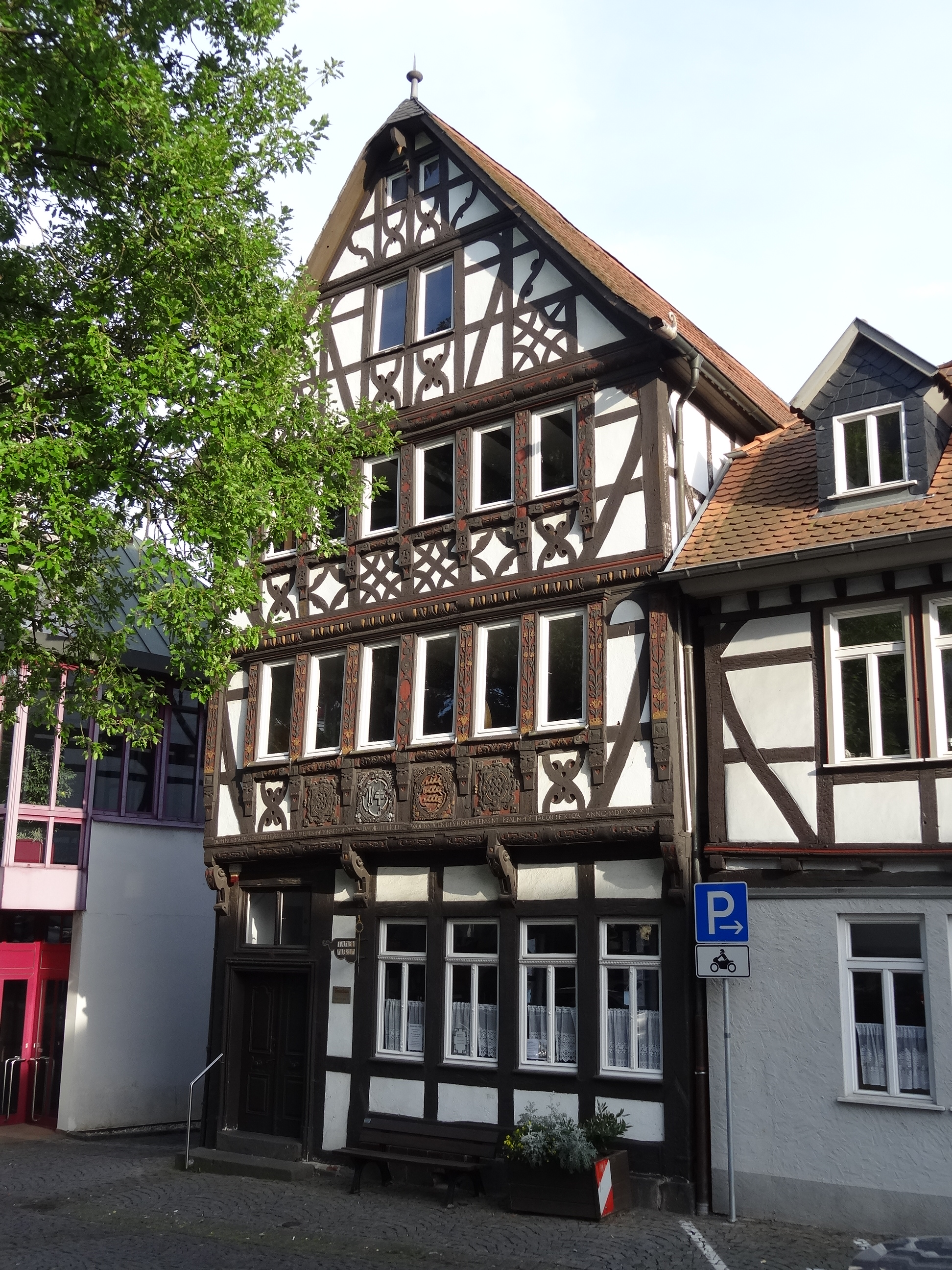 Kirchenplatz 4 (Lich)